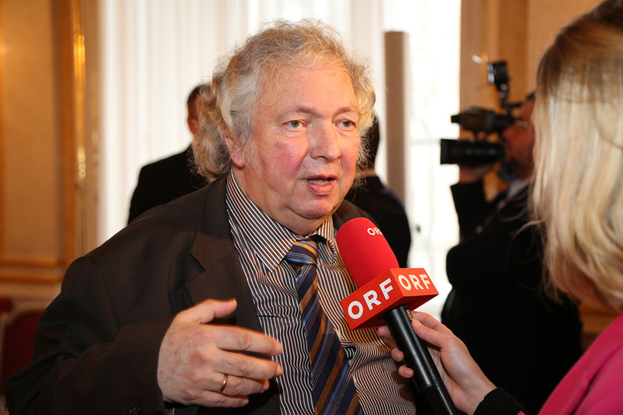 Peter Dusek-1926